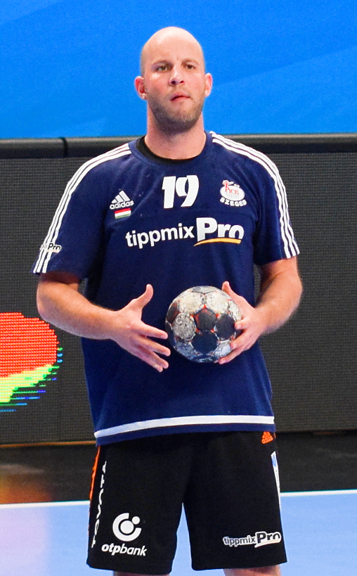 Rencontre de quart de finale de la ligue des champions 2016-17 entre le PSG et Pick Szeged. A Coubertin, le 29 avril 2017.